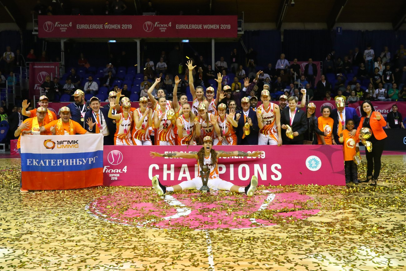 УГМК - пятикратный чемпион Евролиги. УГМК Екатеринбург - "Динамо" (Курск) 91:67